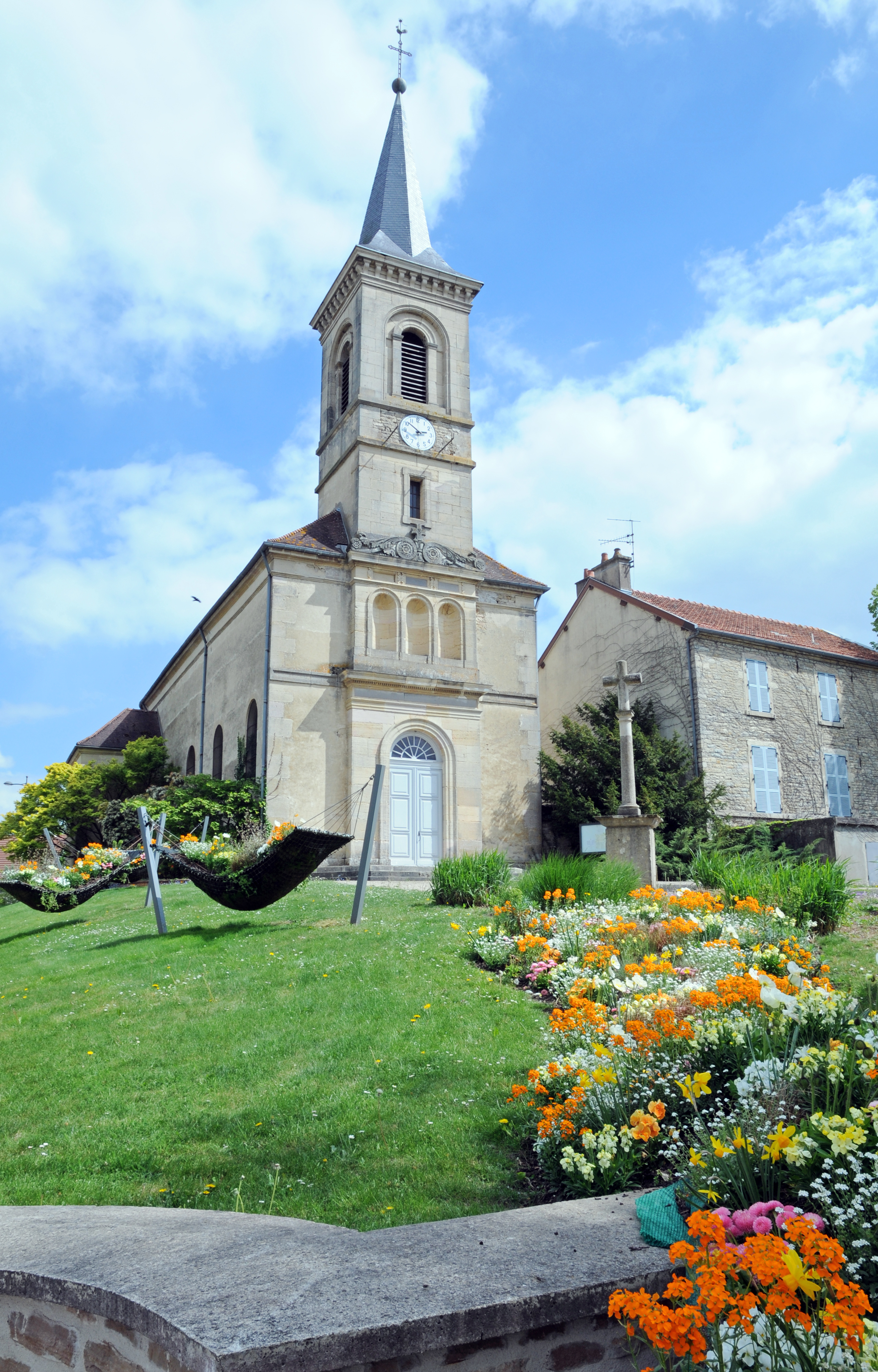 Eglise St Martin Quetigny